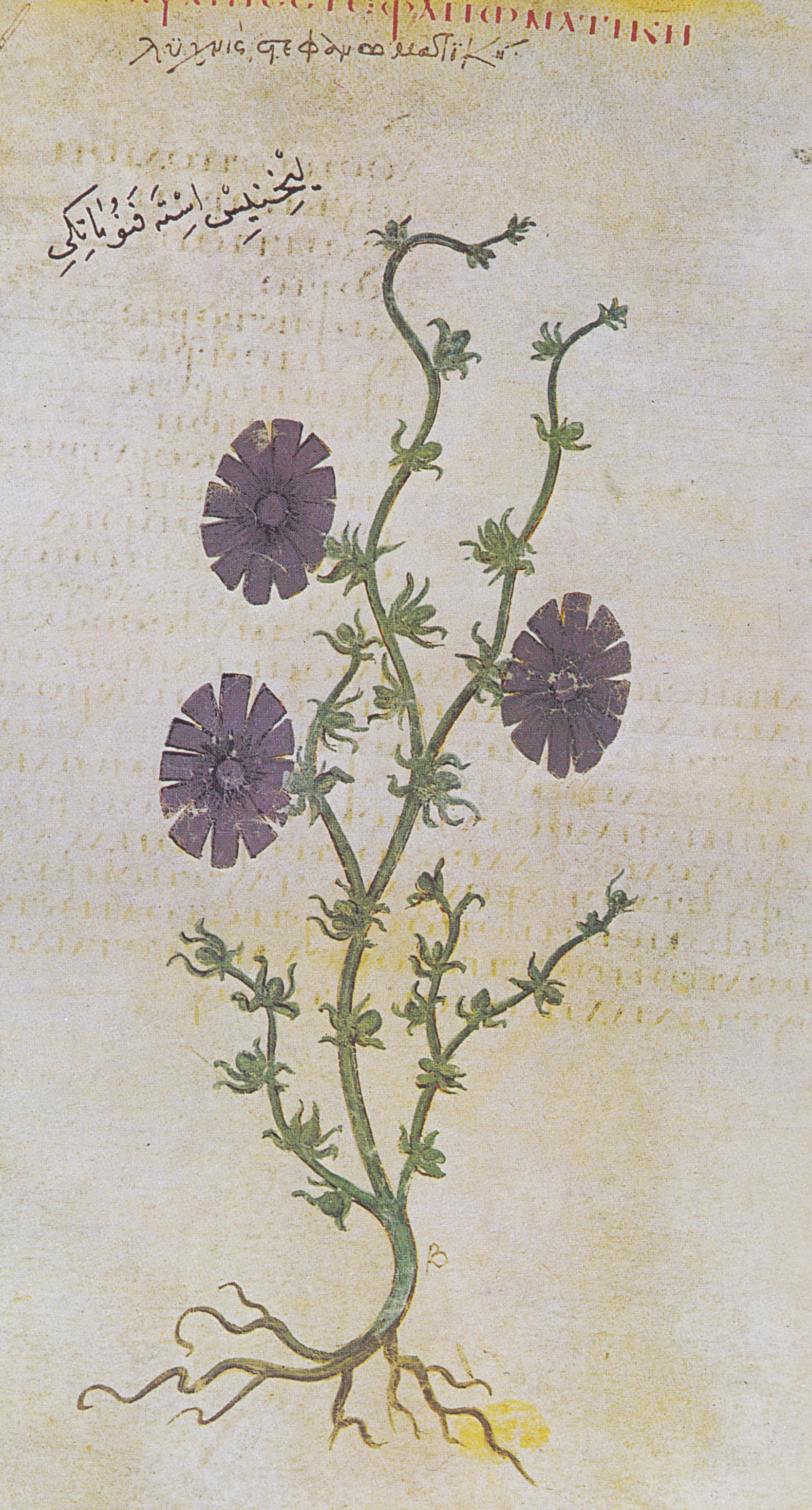 Abbildung von „Lychnis agria" (λυχνις στεφανωματική)